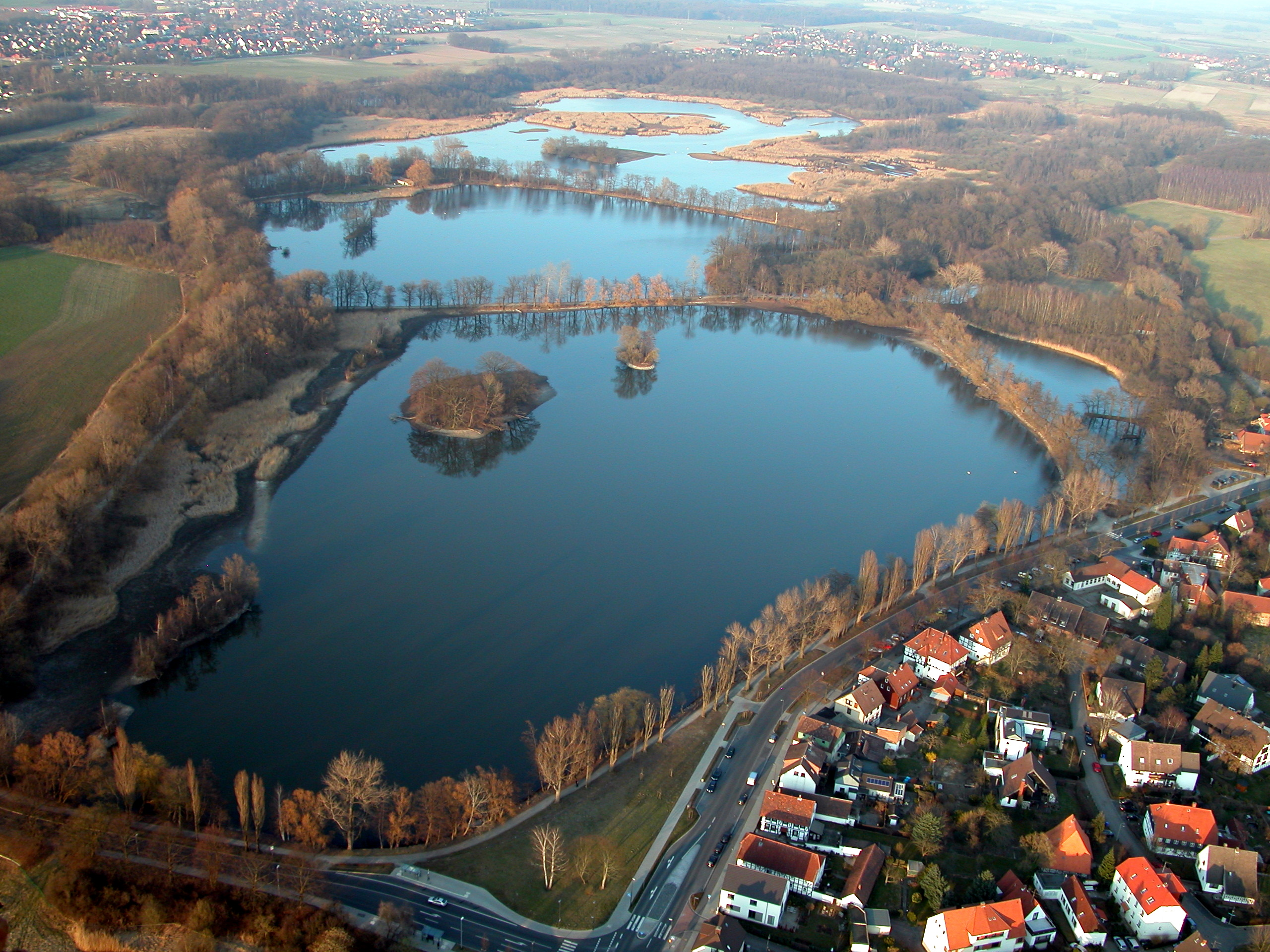 Braunschweig: Riddagshäuser Teiche. Von unten nach oben: Kreuzteich, Mittelteich, Schapenbruchteich. Rechts unten die Ortschaft Riddagshausen (von Südwesten gesehen).